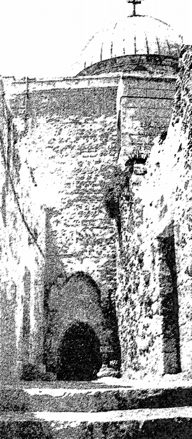 דיר אל עדס